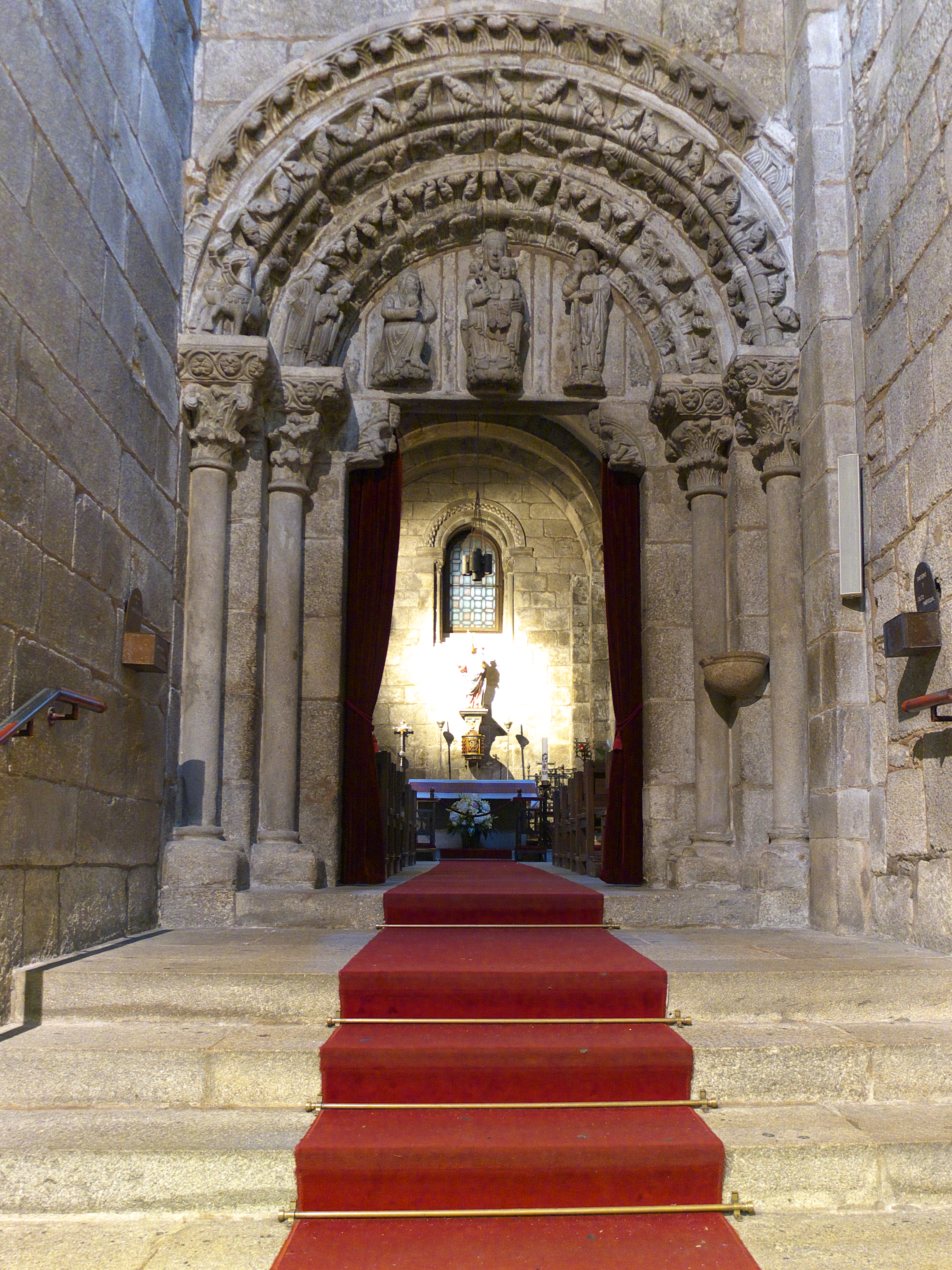 Alfonso III de Asturias manda construir una basílica mayor, la Iglesia de Santiago, y junto a ésta, el monasterio benedictino de Antealtares y su iglesia de San Salvador; y la iglesia monacal de Santa María de la Corticela (899). El caudillo Almanzor destruyó este núcleo (997). A comienzos del siglo XIII se reconstruye esta iglesia de la Corticela, con una bellísima portada, que sigue el estilísmo del Maestro Mateo.